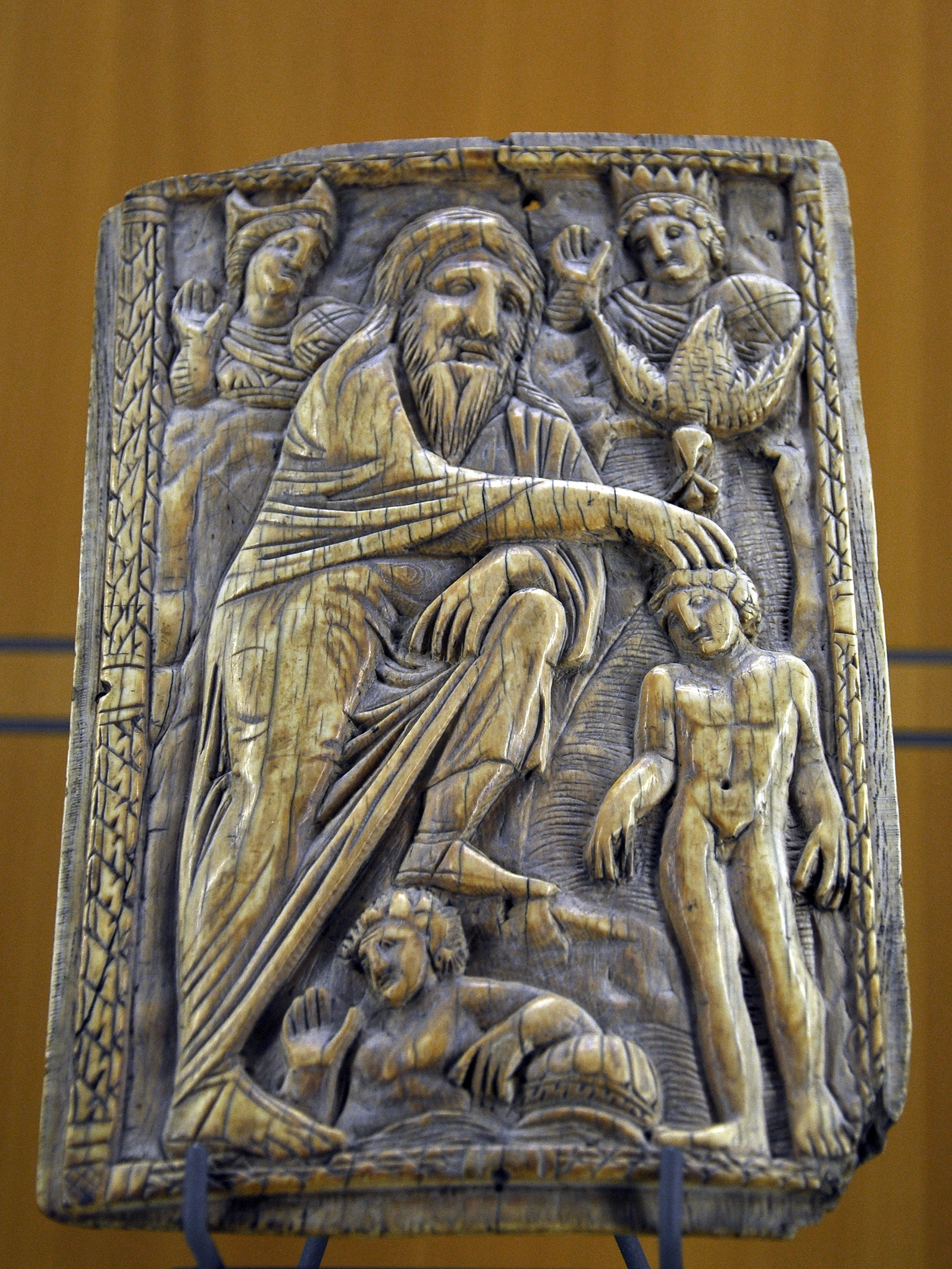 Ivoire byzantin, 2ème moitié du 6ème siècle après JC, Méditerranée orientale (?), représentant le baptême du Christ. Musée des Beaux-Arts de Lyon.